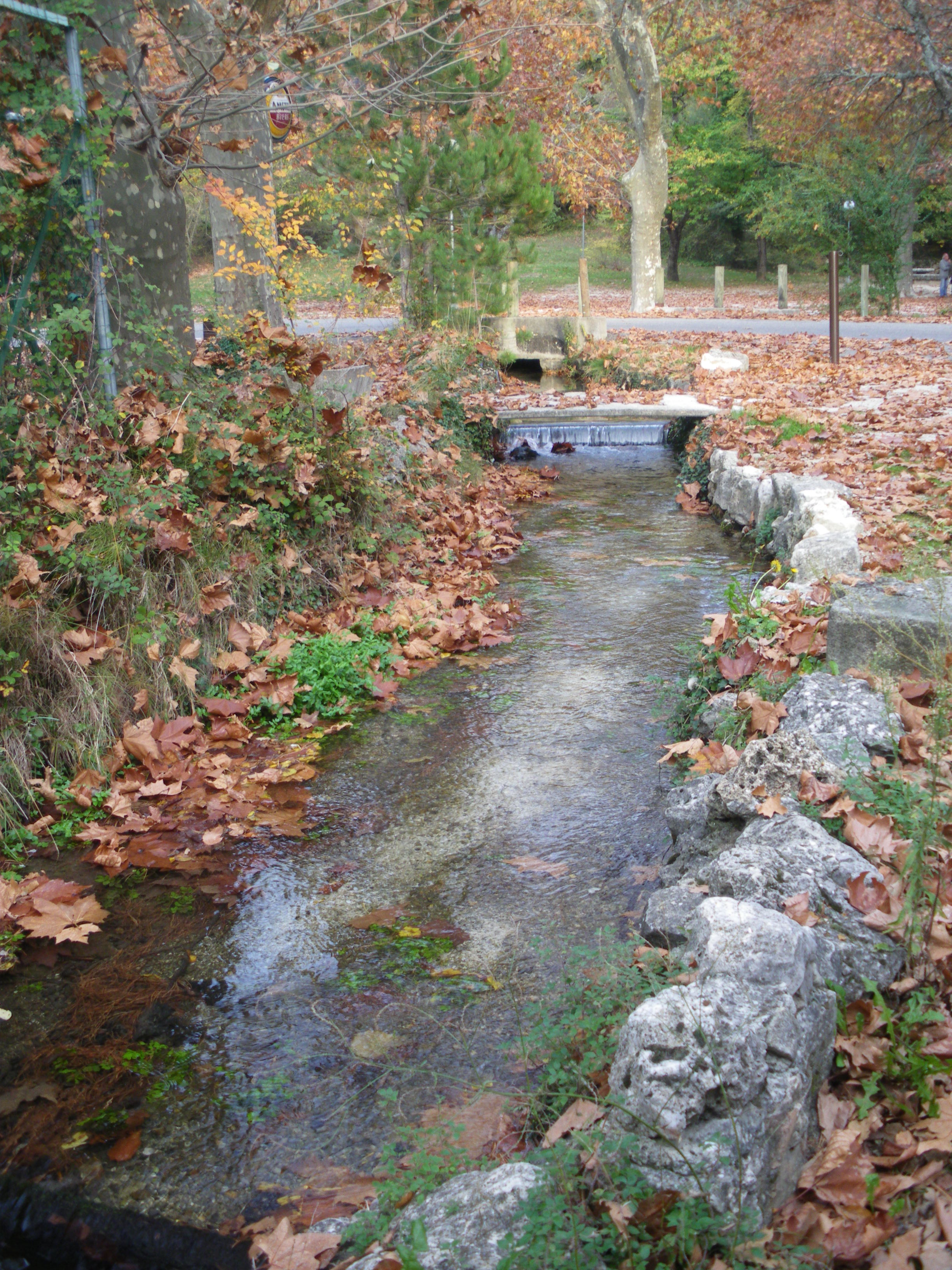 Le Groseau, rivière du Vaucluse, à Malaucène, France